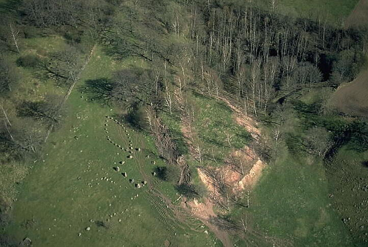 Gravfält Motiv: Amundtorp Nyckelord: Flygbilder, Riksintressen Kategori: Grav- och boplatsområde Gravfält.